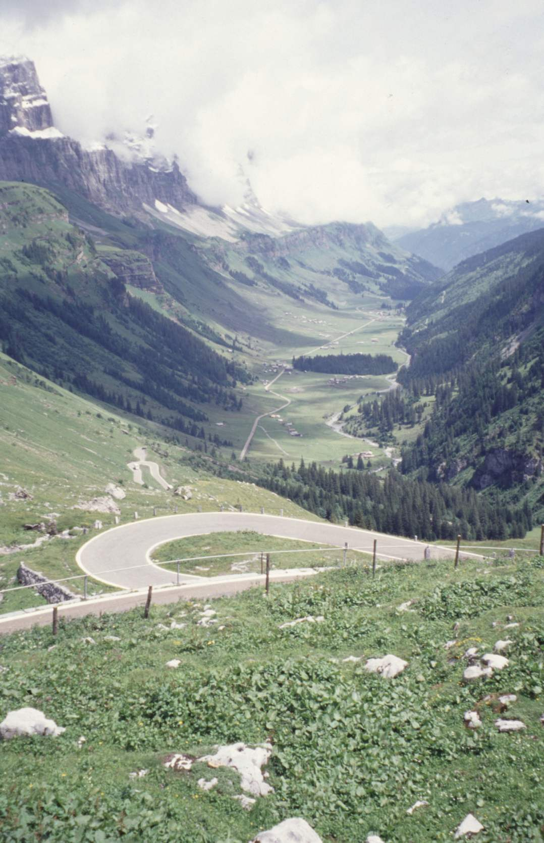 Der Urnerboden, fotografiert von der Klausenpasstrasse